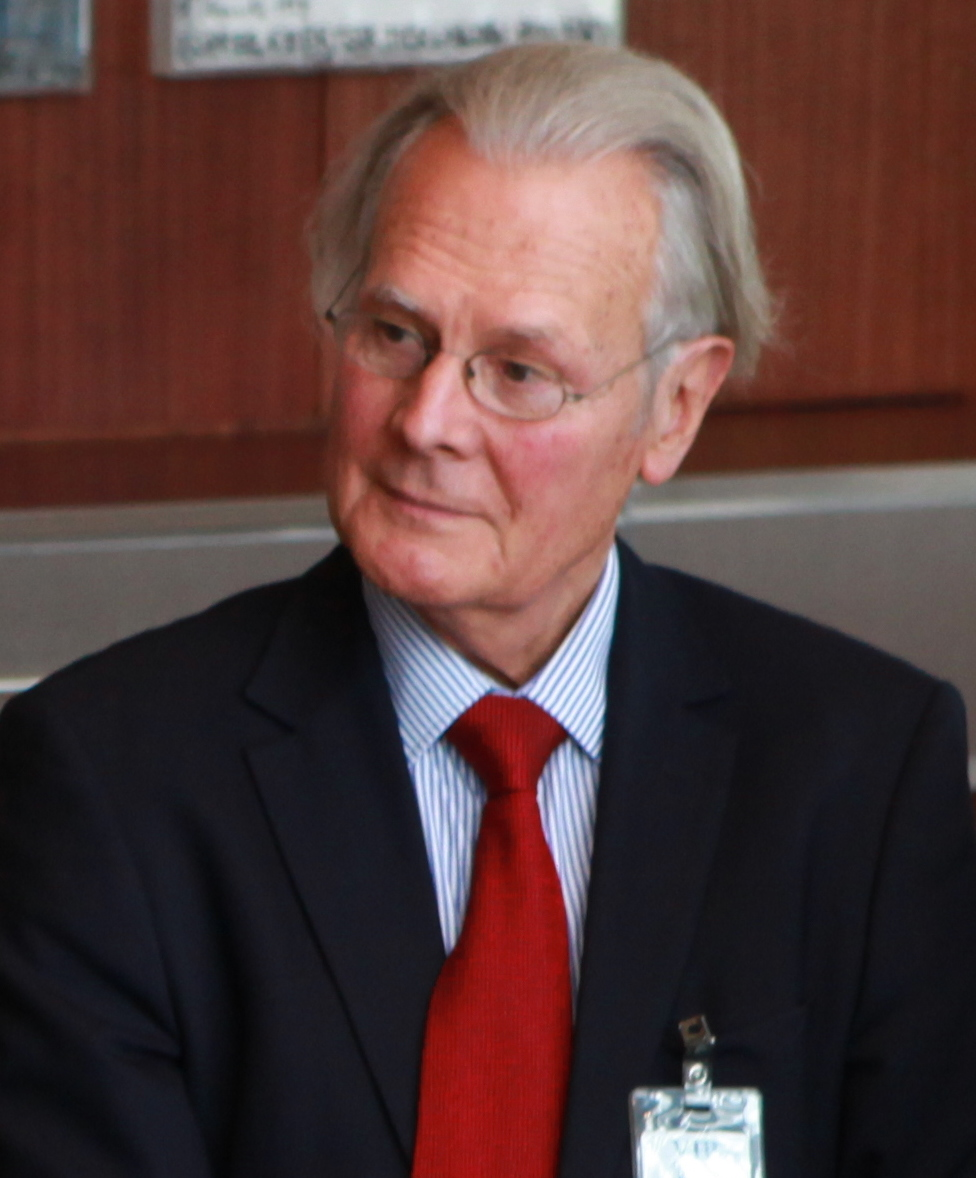 Jenö Staehelin in Berlin, 2015